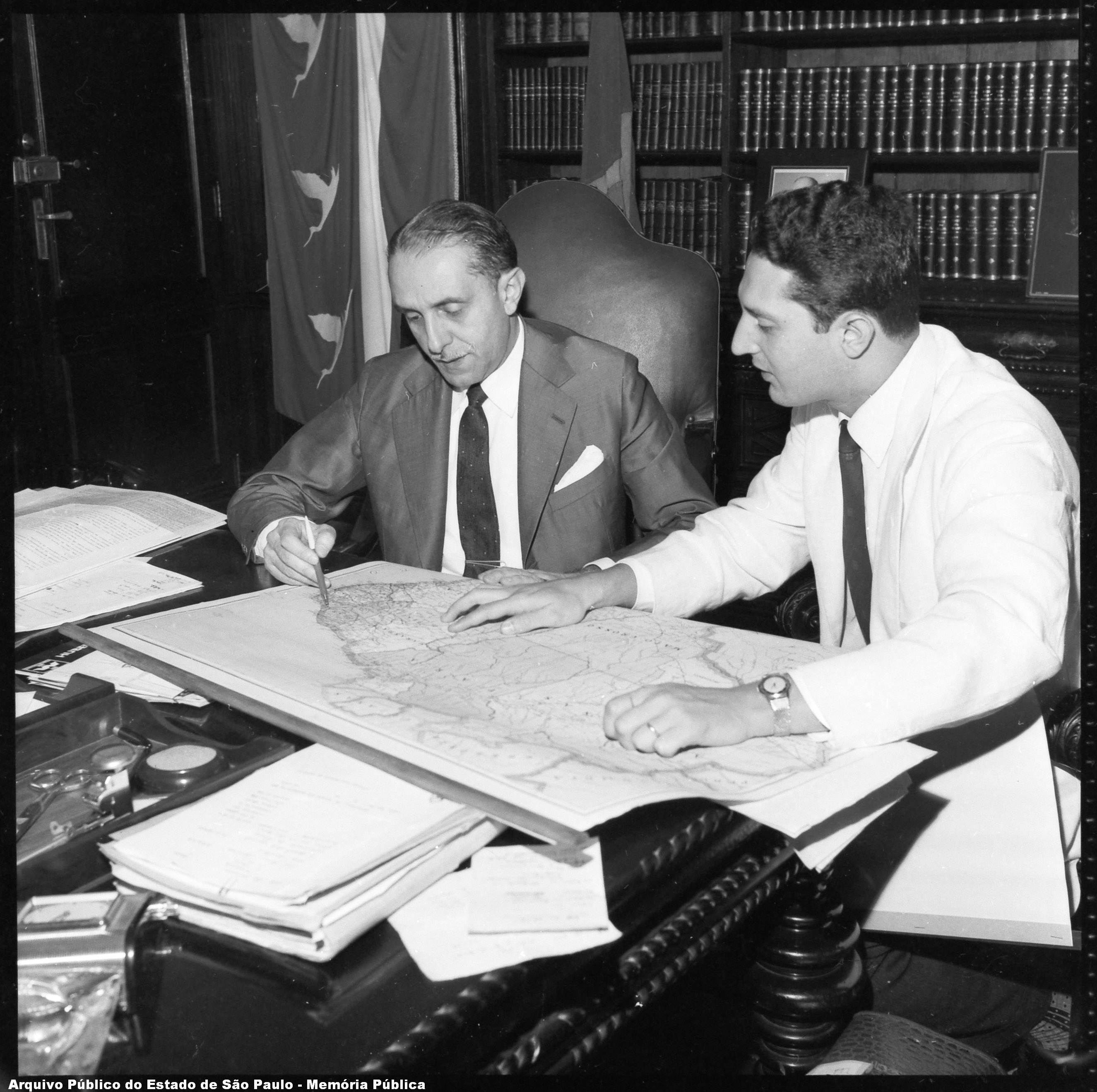 O governador do estado de São Paulo Carvalho Pinto em reunião com o coordenador do Plano de Ação do Governo do Estado de São Paulo Plínio de Arruda Sampaio. Imagem do acervo iconográfico do Arquivo Público do Estado de São Paulo, código BR APESP SEGOV ICO NEG 0111 01